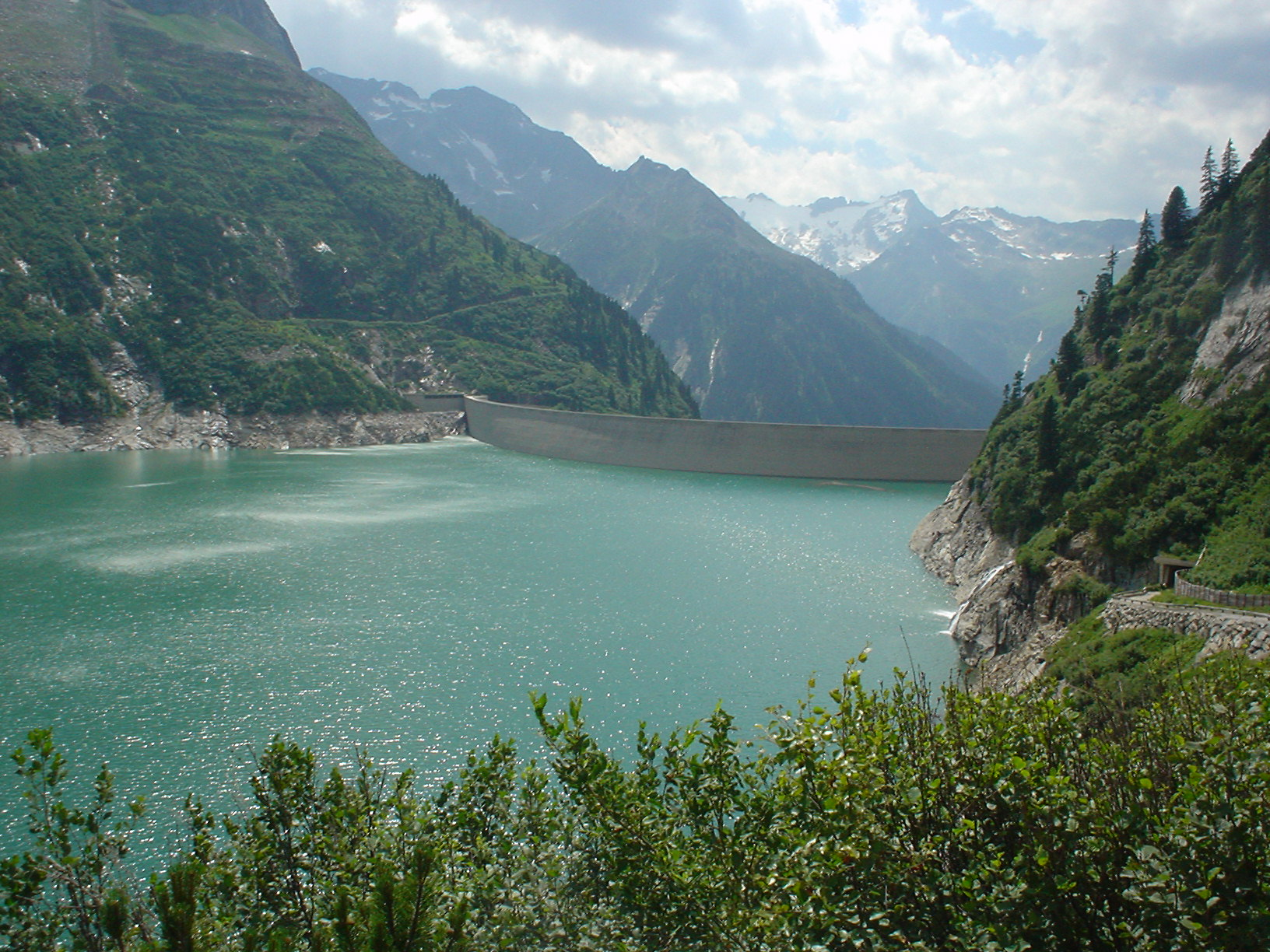 Staumauer Seeseite